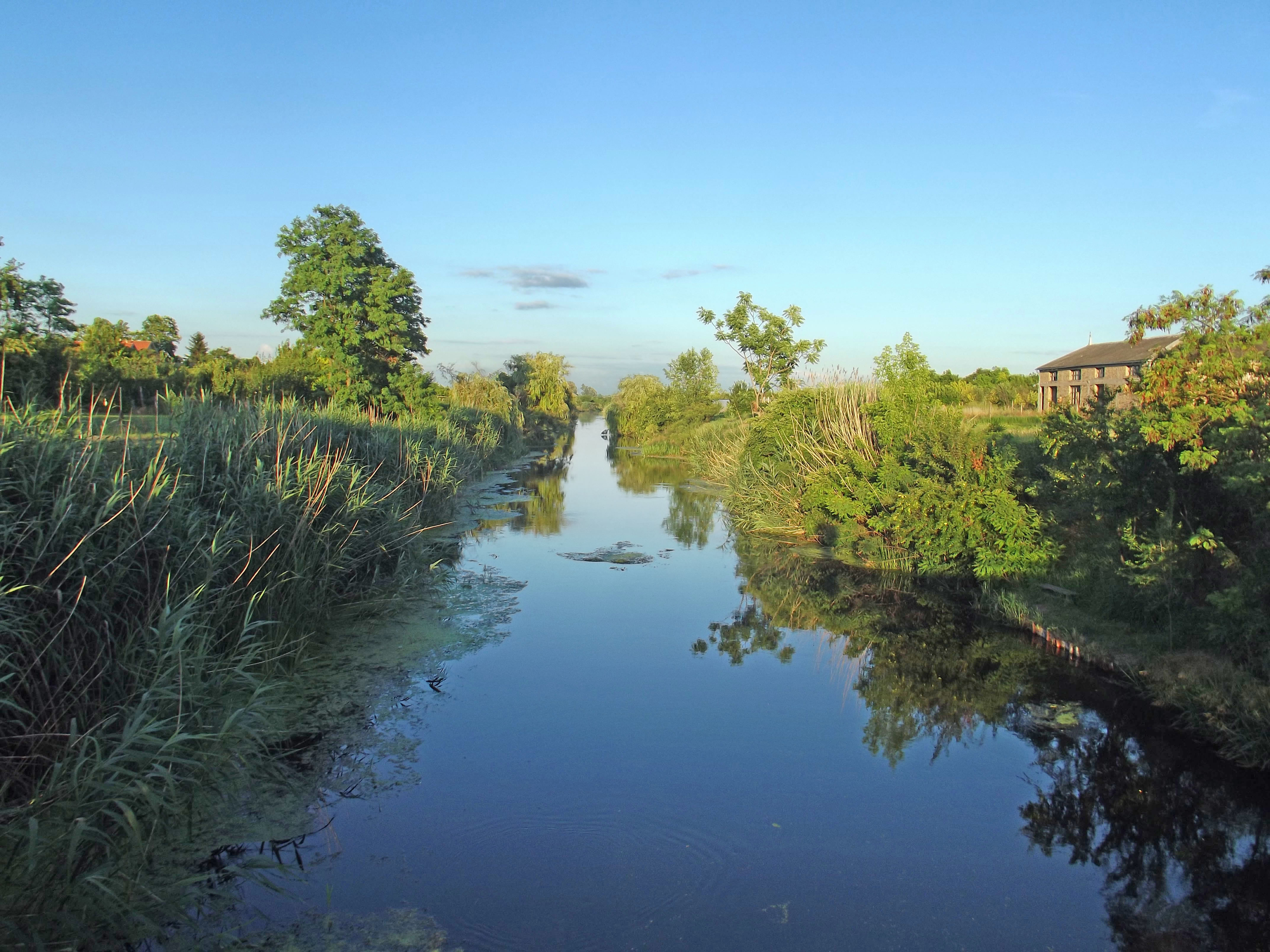 Srpski (latinica): Ово је фотографија заштићеног природног добра у Србији под шифром: ПП02 This is a a photo of a natural area in Serbia with ID: ПП02 Park prirode Jegrička u Zmajevu, opština Vrbas.